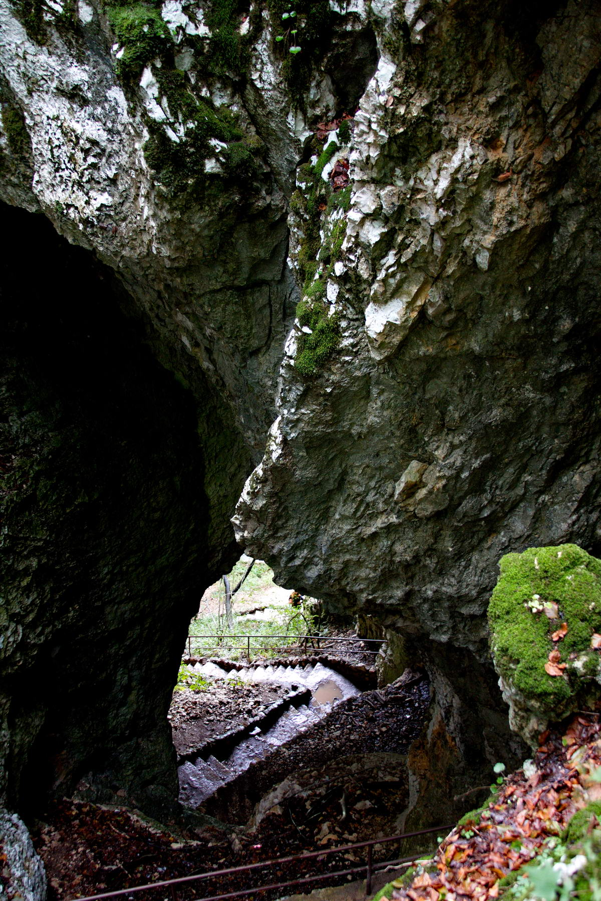 Пещера Шупляра в национальном парке "Плитвицкие озёра", Хорватия, вид сверху. Фотография сделана 15 сентябре 2012 года.